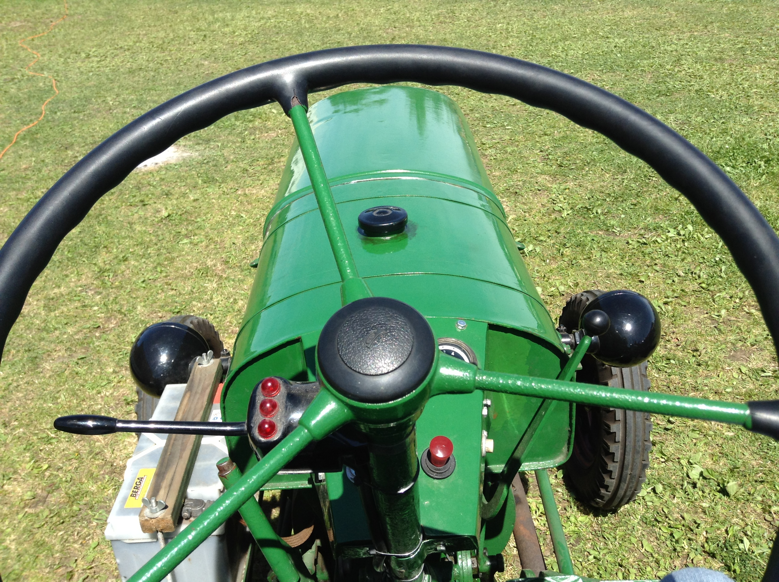 Fahreransicht eines Wesseler WL24